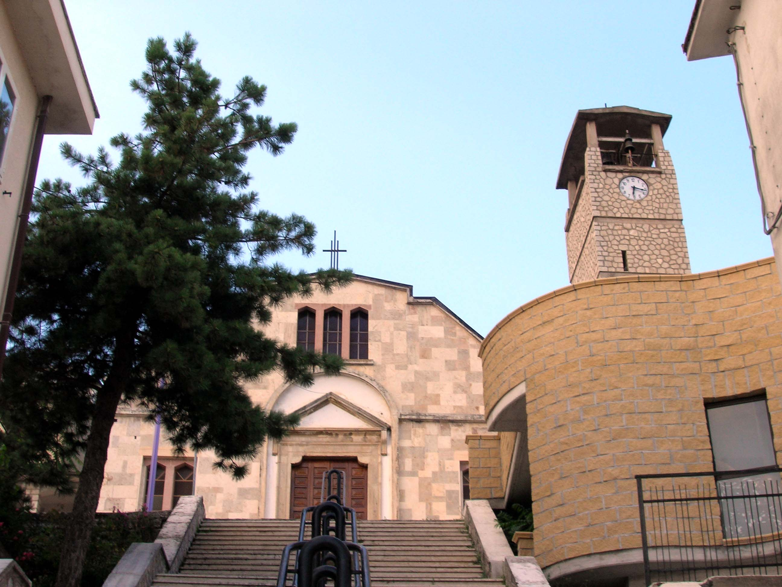 Chiesa B.V. Addolorata di Villa d'Agri (PZ) - Italy